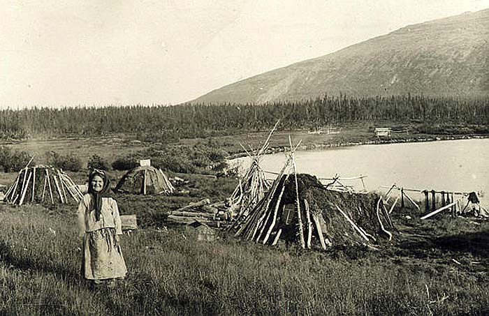 Жінка_біля_промислових_будівель_рибалок._Саами._20і__рр._XX_ст._Фонди_РЕМ..jpg: Жінка біля промислових будівель рибалок. Саами. 20-і рр. XX ст. Фонди РЕМ.